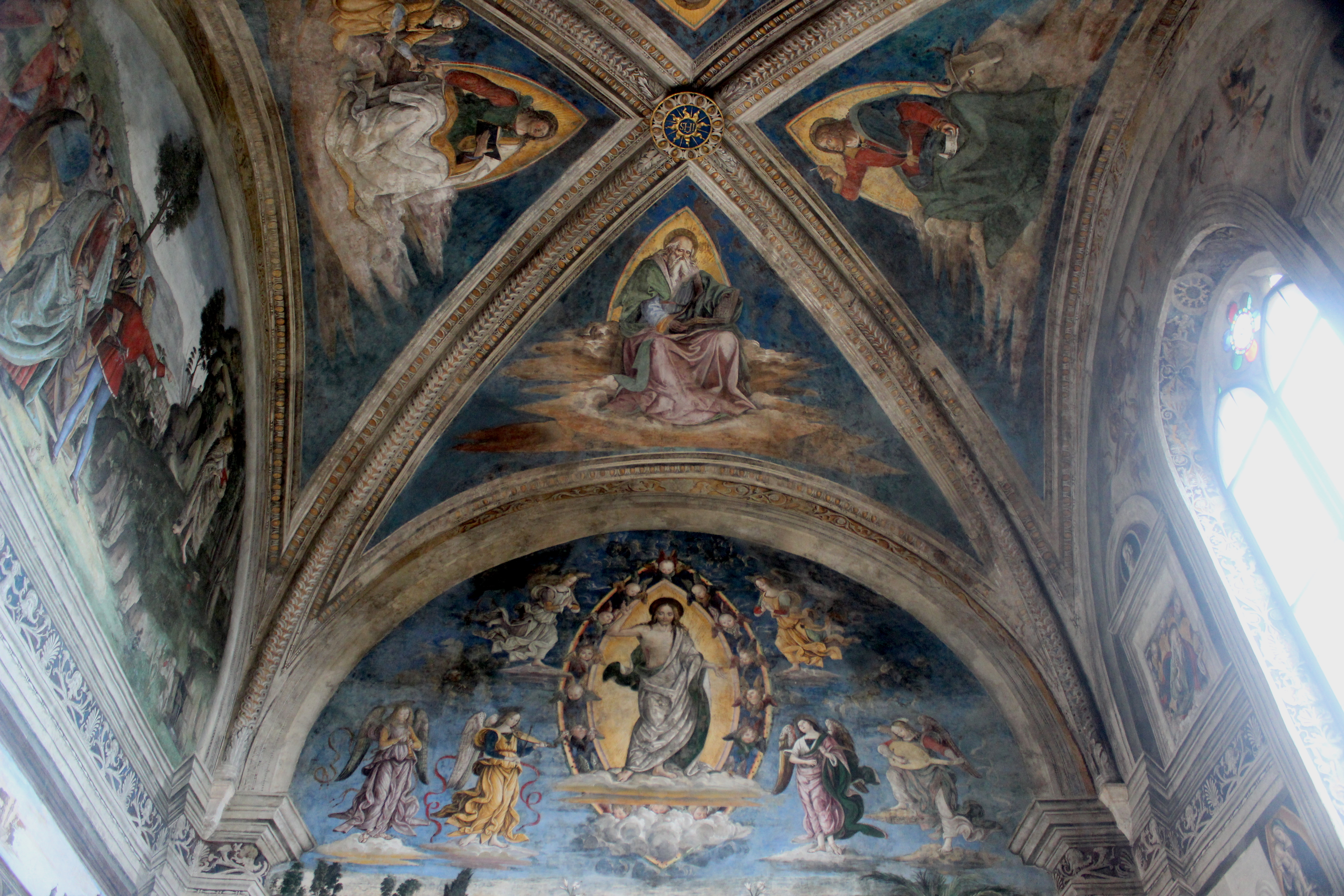 Roma. Santa Maria in Aracoeli. Capilla Bufalini.